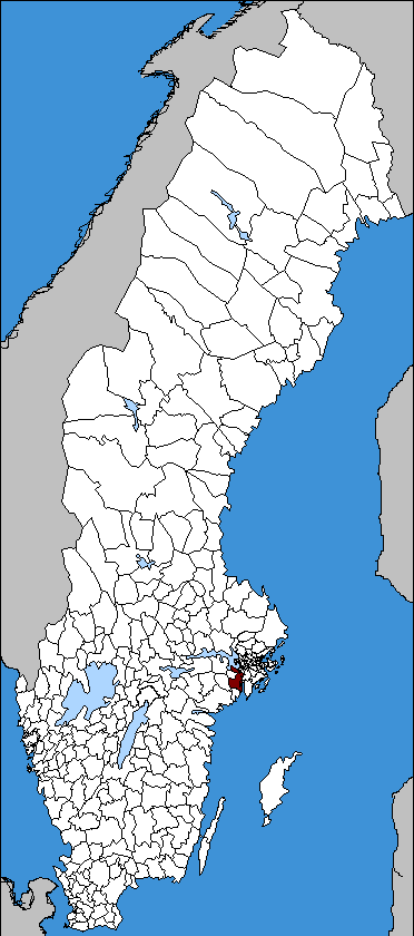 Södertälje in Sweden